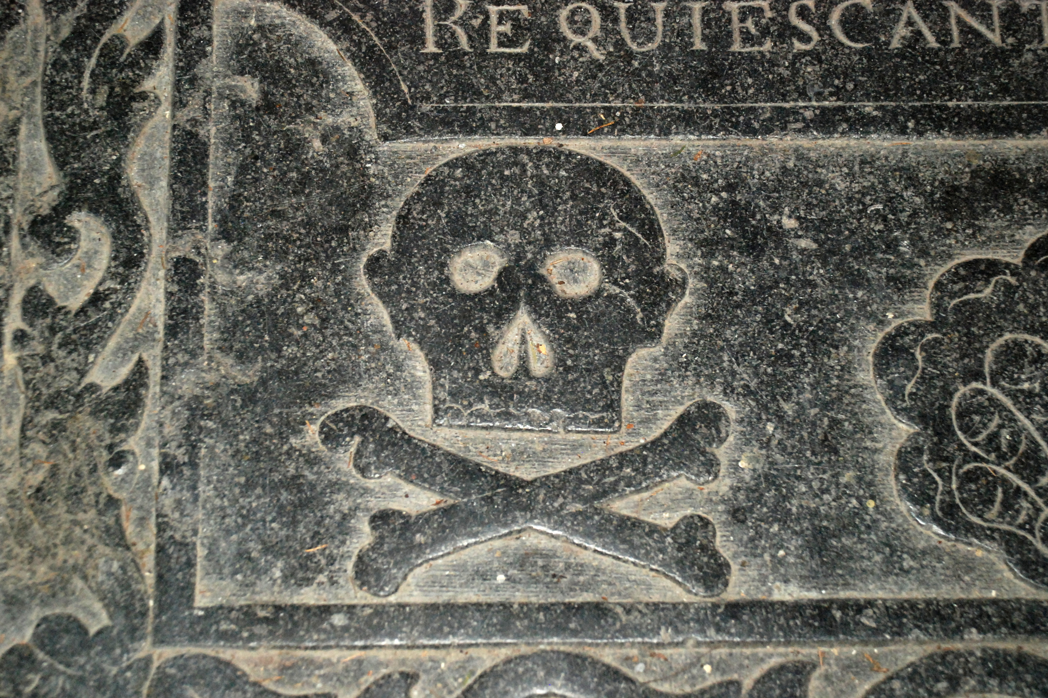 Belgique - Brabant wallon - Église Saint-Martin de Ways